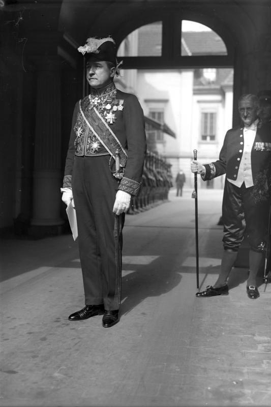 Grosser Diplomaten-Empfang beim Reichspräsidenten von Hindenburg ! Der neue argentinische Gesandte in Berlin Dr. Eduardo Labougle, verlässt nach der Ueberreichung seines Beglaubigungsschreibens das Reichspräsidenten Palais.